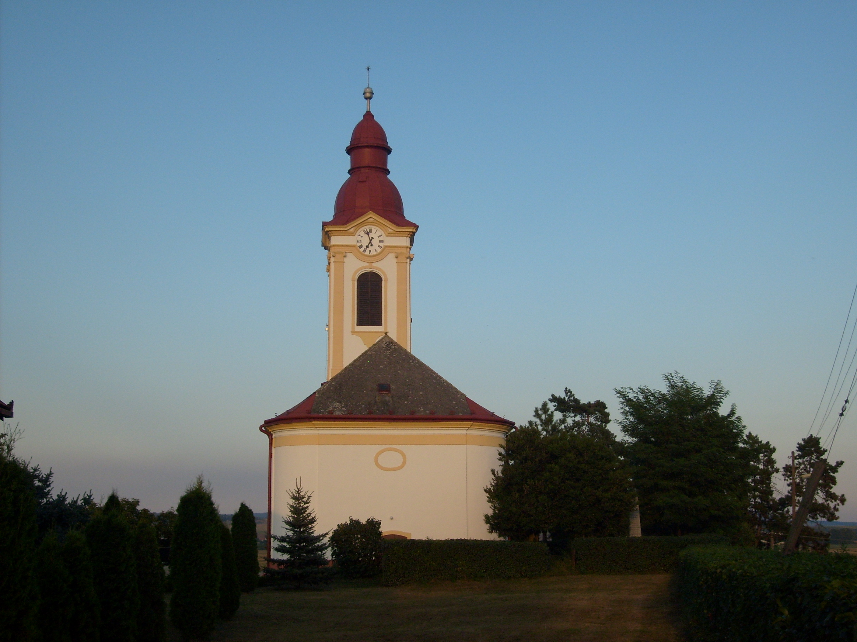 A hanvai református templom